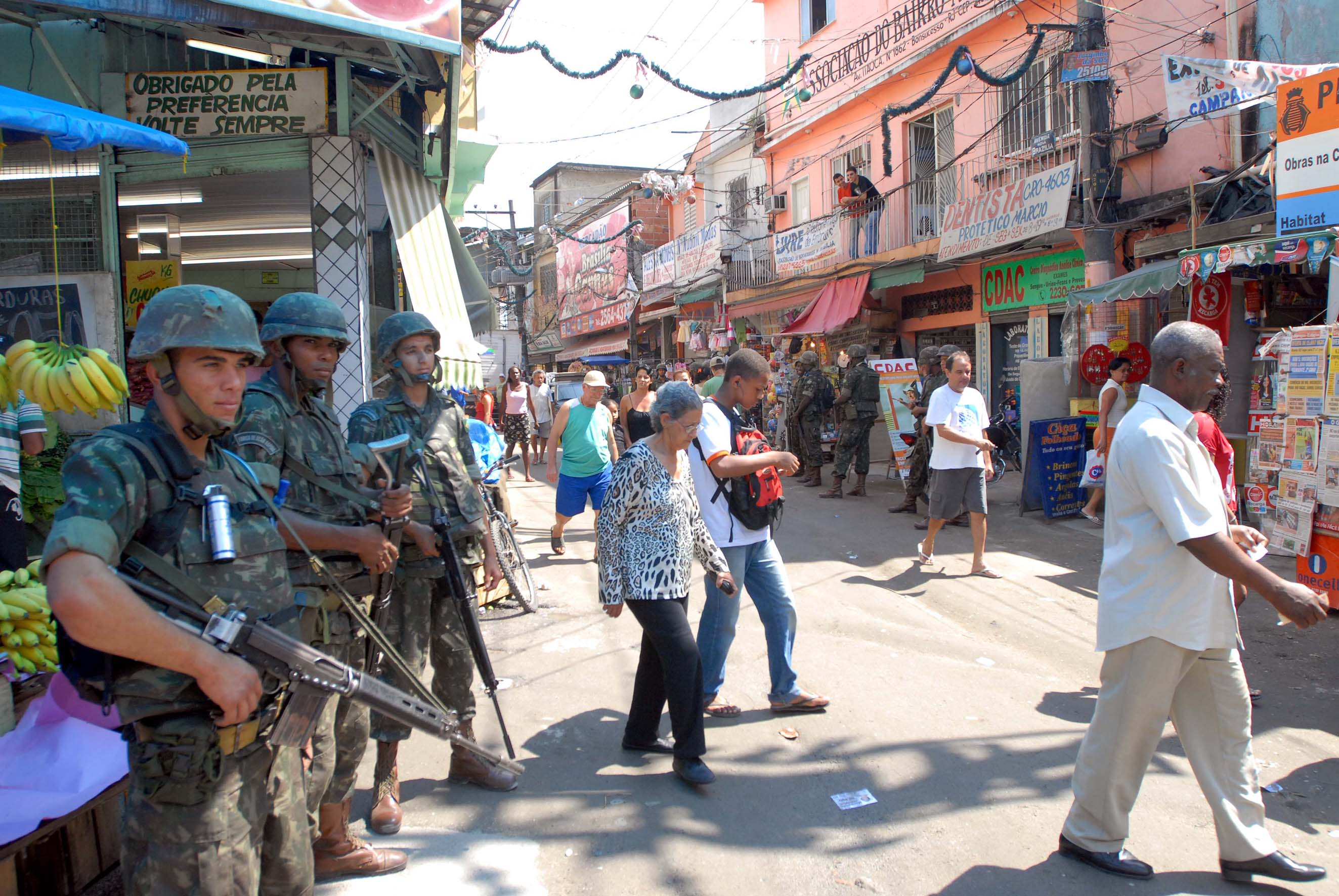 Rio de Janeiro - As Forças Armadas ocupam o Complexo do Alemão, no Rio de Janeiro, para garantir a segurança durante as eleições municipais